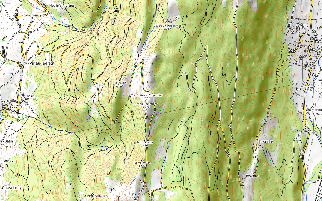 carte réalisée sur umap This map may be incomplete, and may contain errors. Don't rely solely on it for navigation.